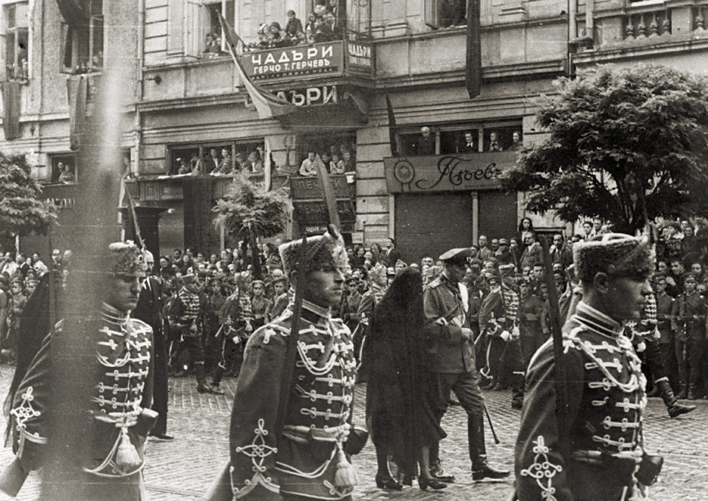 Князь Кирил з вдовою брата, царицею Іоанной на похоронах загиблого царя Бориса.